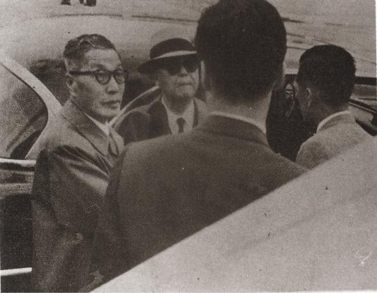 1960년 5월 29일. 망명하는 이승만 박사.